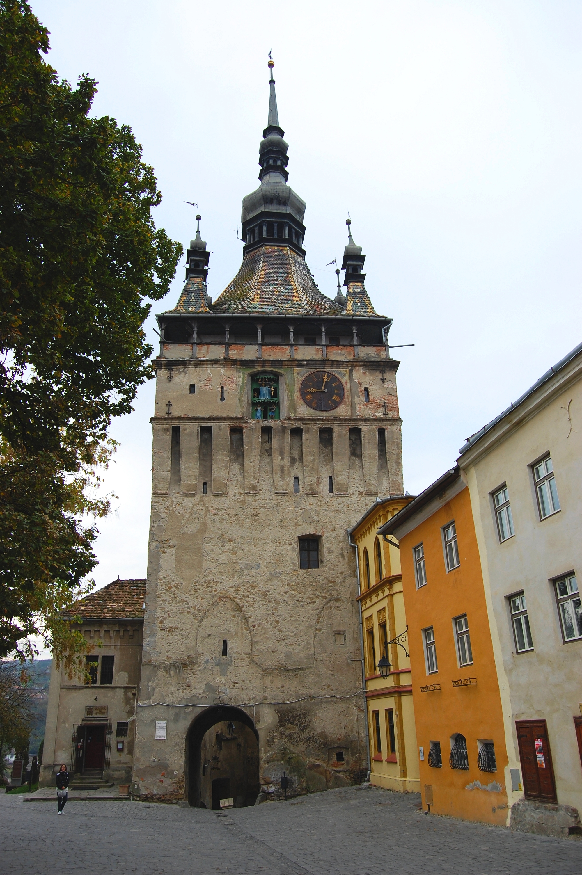 Segesvár - Felsőváros - Óra-torony